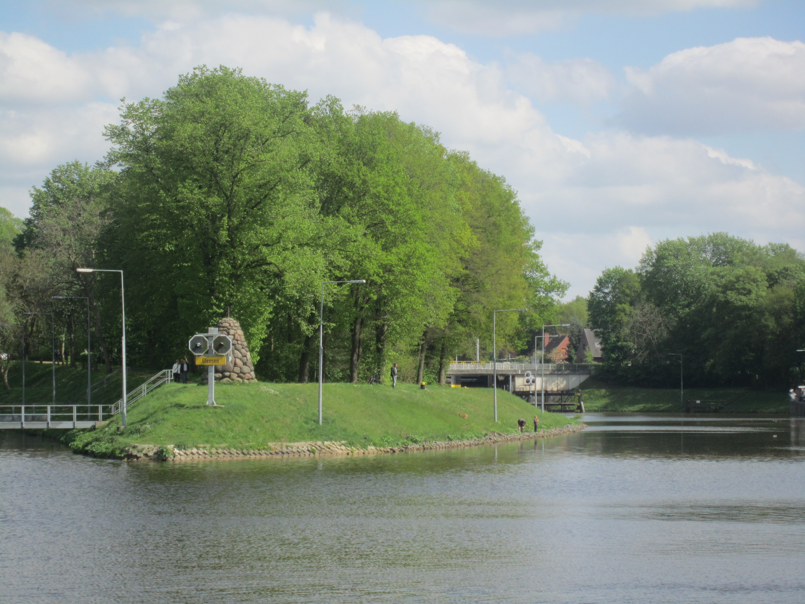 Schleuse Gleesen des Dortmund-Ems-Kanals in Emsbüren, NICHT die Ems bei Lingen!